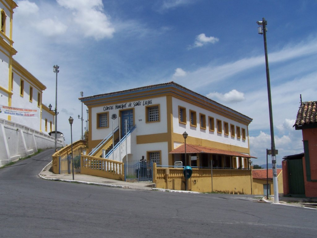 Câmara Municipal de Santa Luzia, Minas Gerais, Brasil.